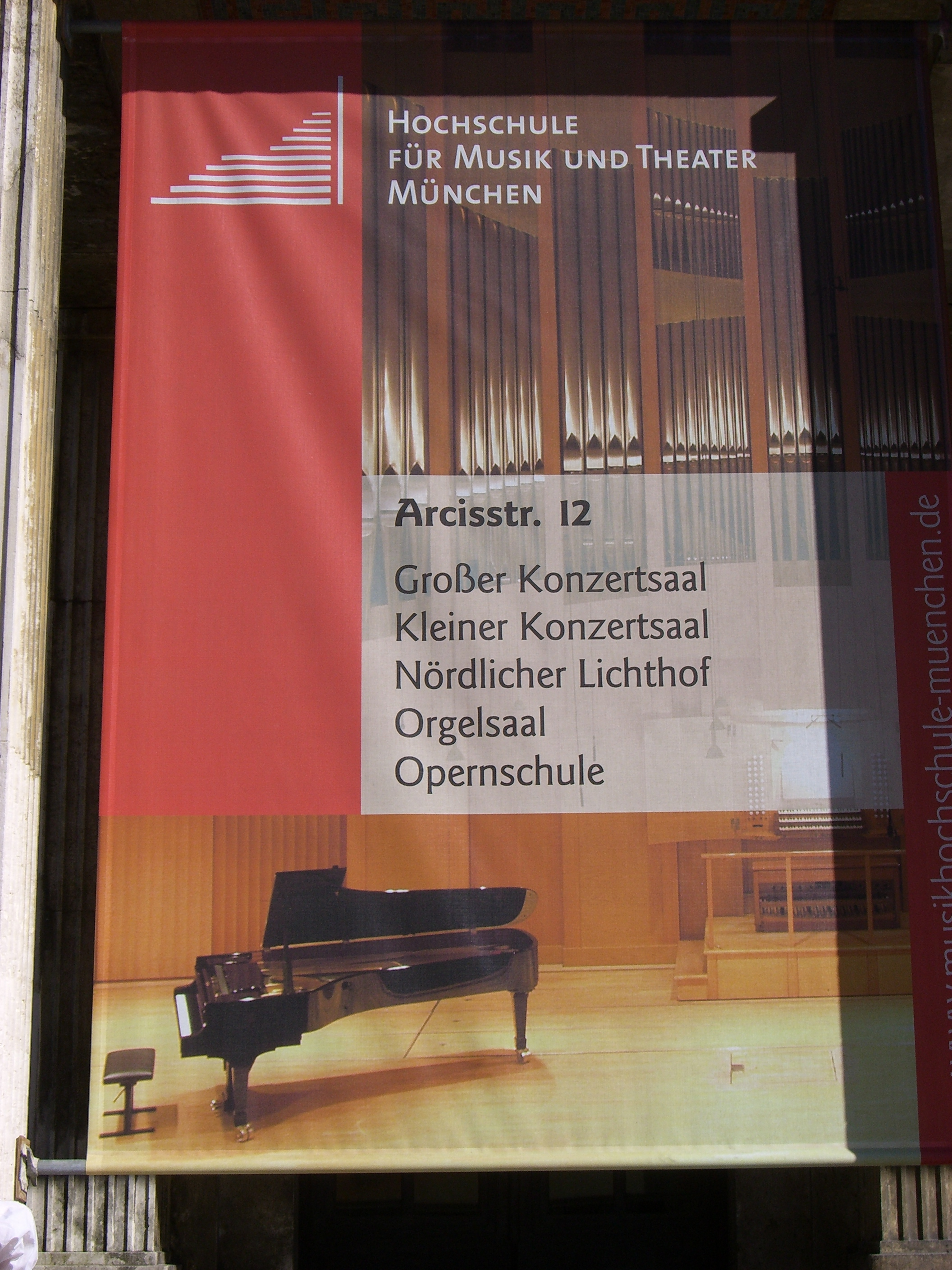 München: Hochschule für Musik und Theater (Aushang)